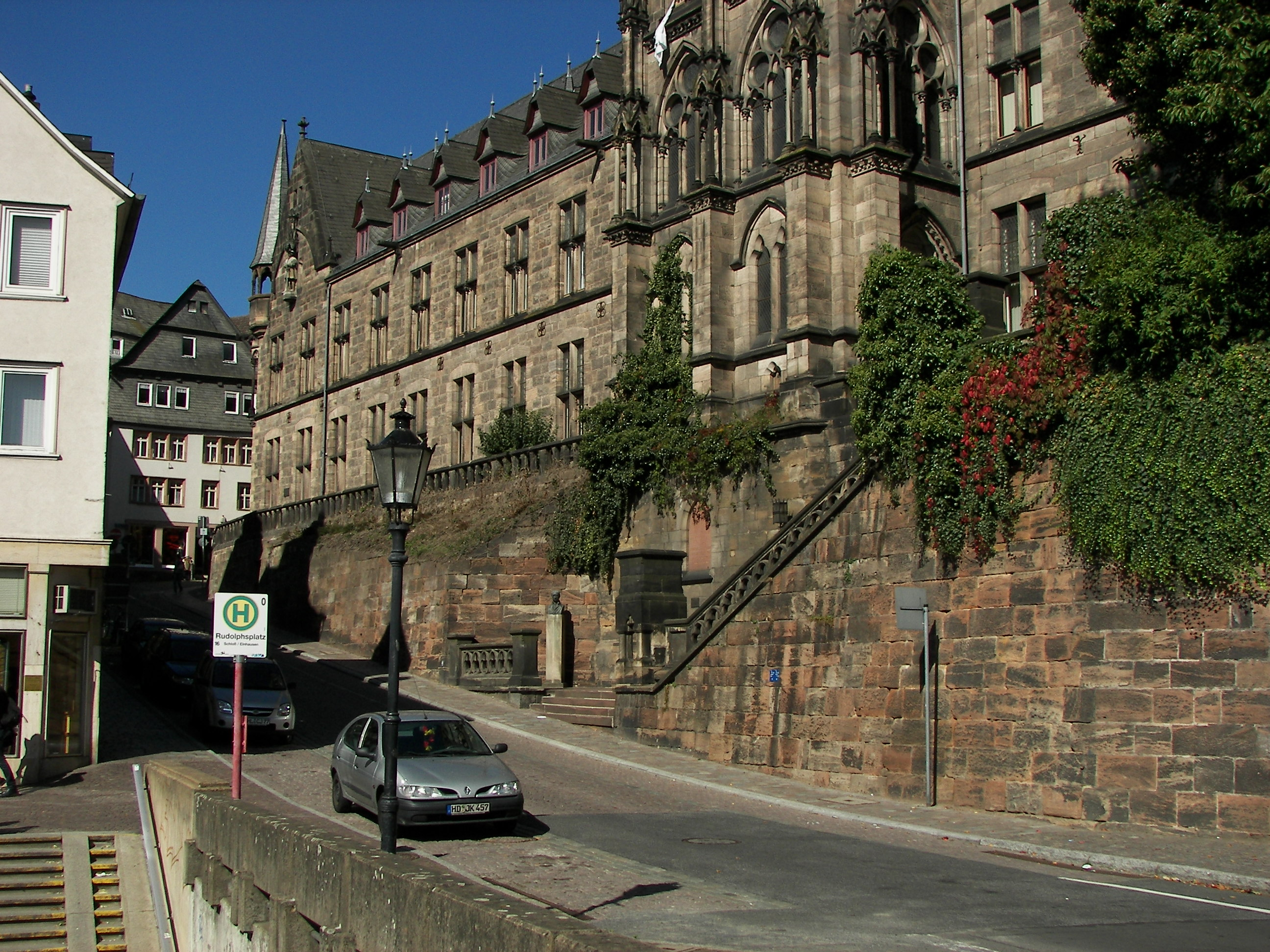 Marburg, Alte Universität, Lahntor